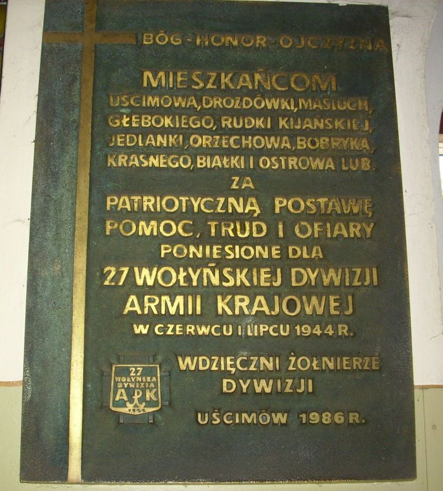 Stary Uścimów (powiat lubartowski). Tablica w miejscowym kościele.